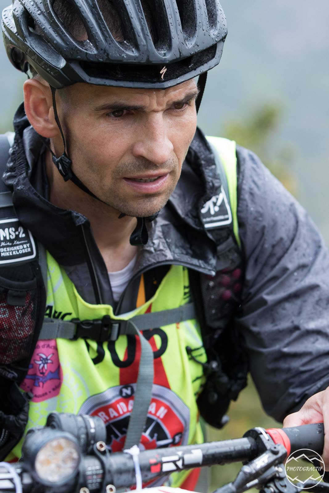 adventure race, portrét